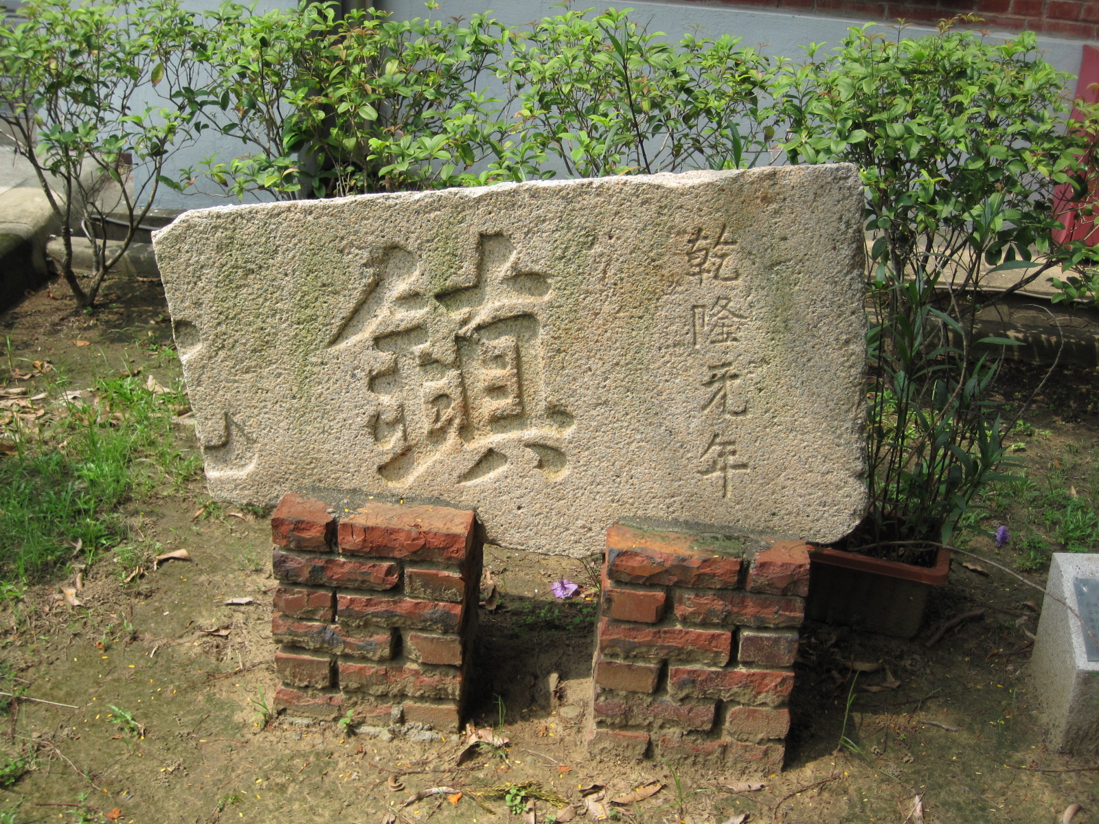 臺南小北門門額，僅餘殘片